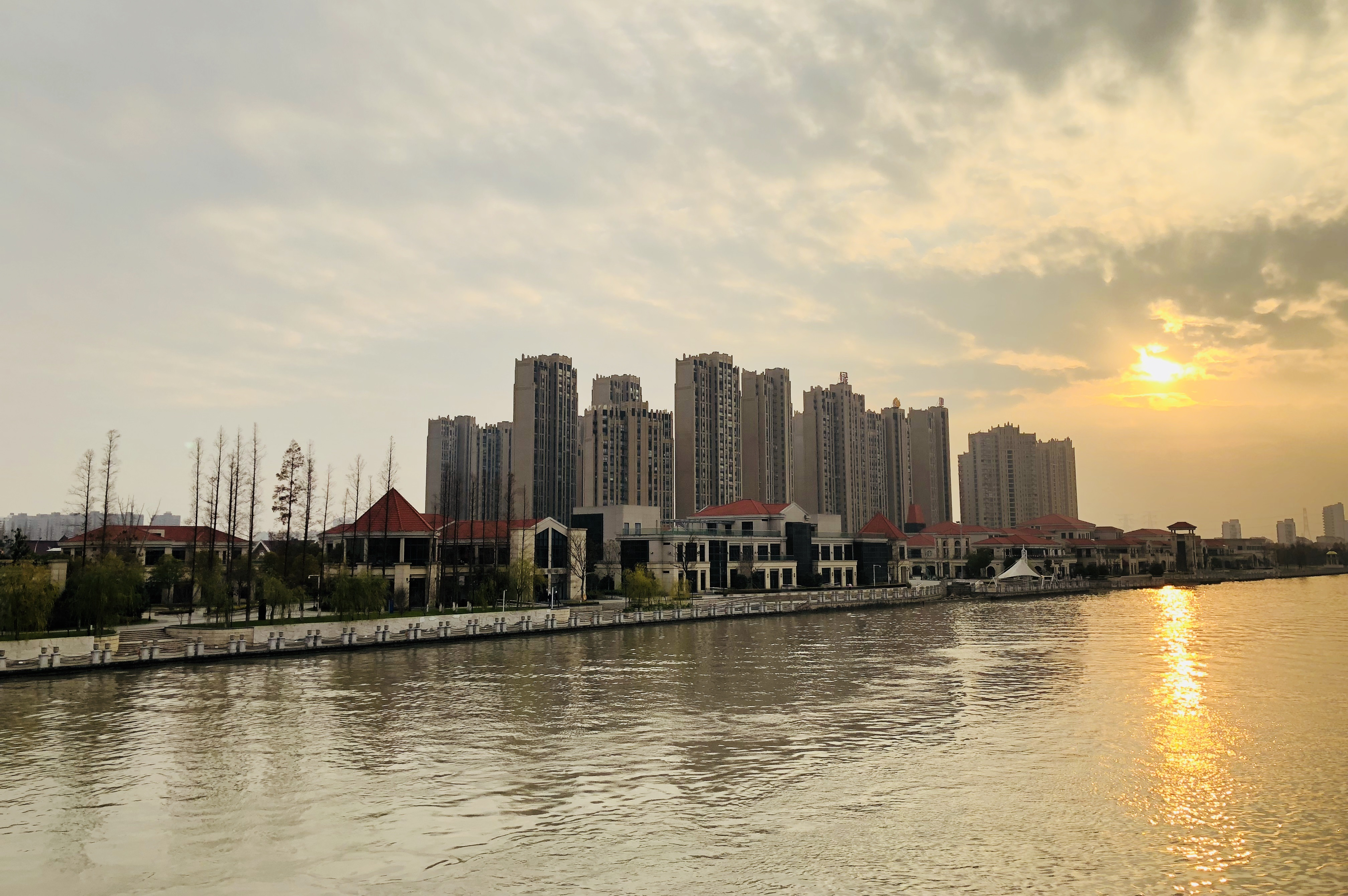 中文（中国大陆）: 南珠大桥上望浏河、海运堤风情街